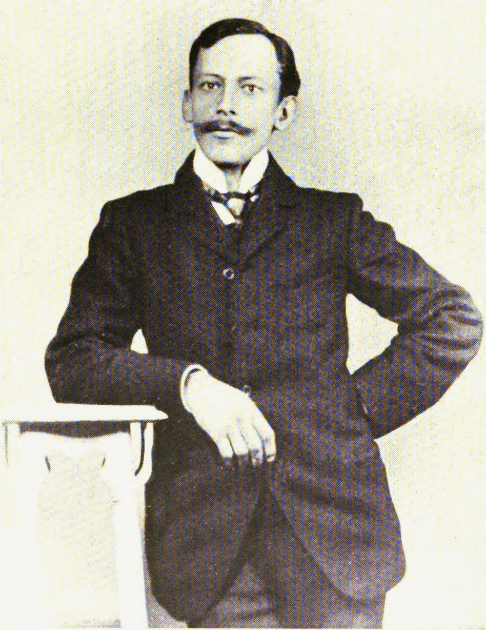 Ivan Platonovič Kaljaev